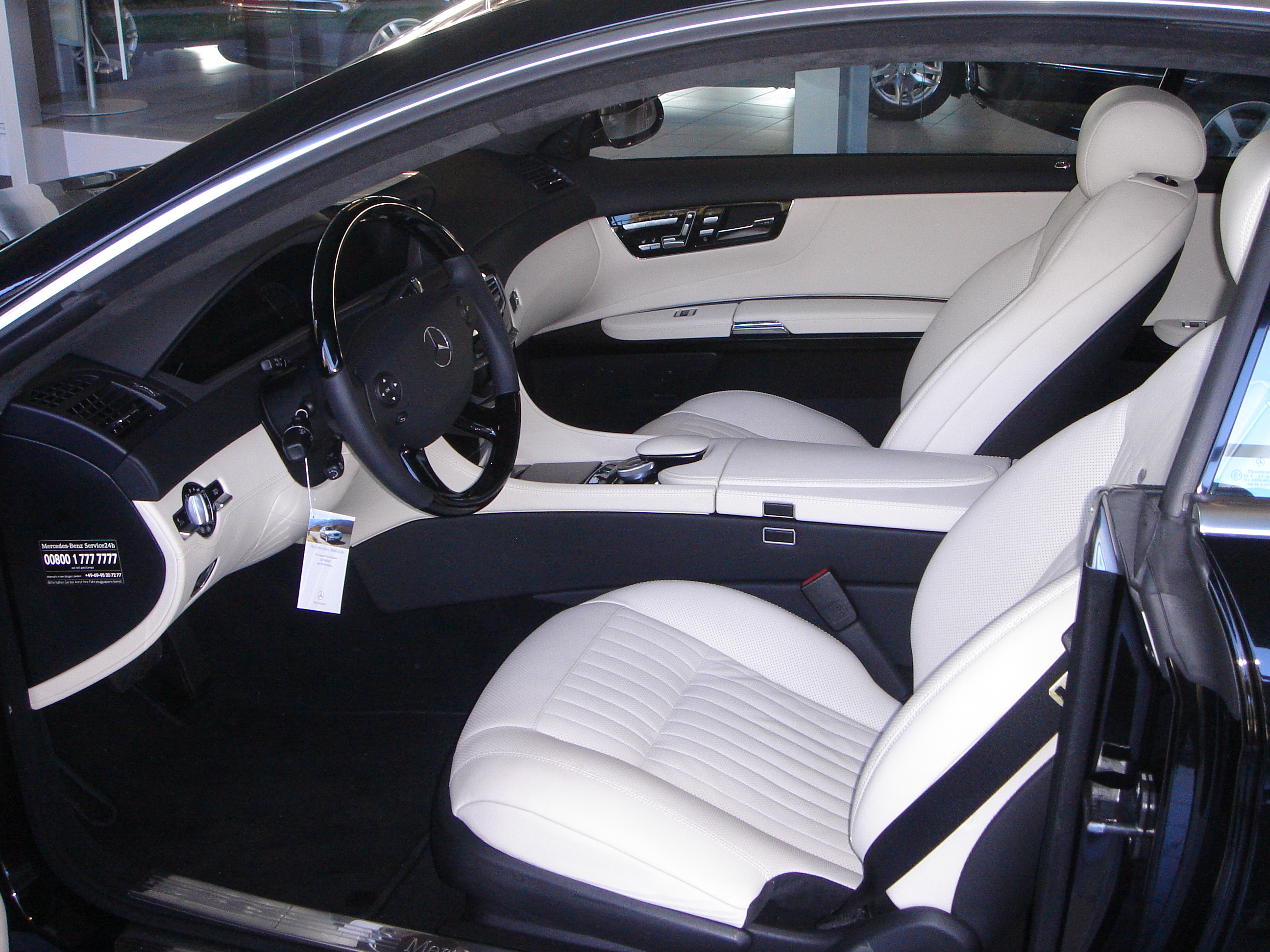 Mercedes-Benz C216 CL-Klasse Designo Innenraum